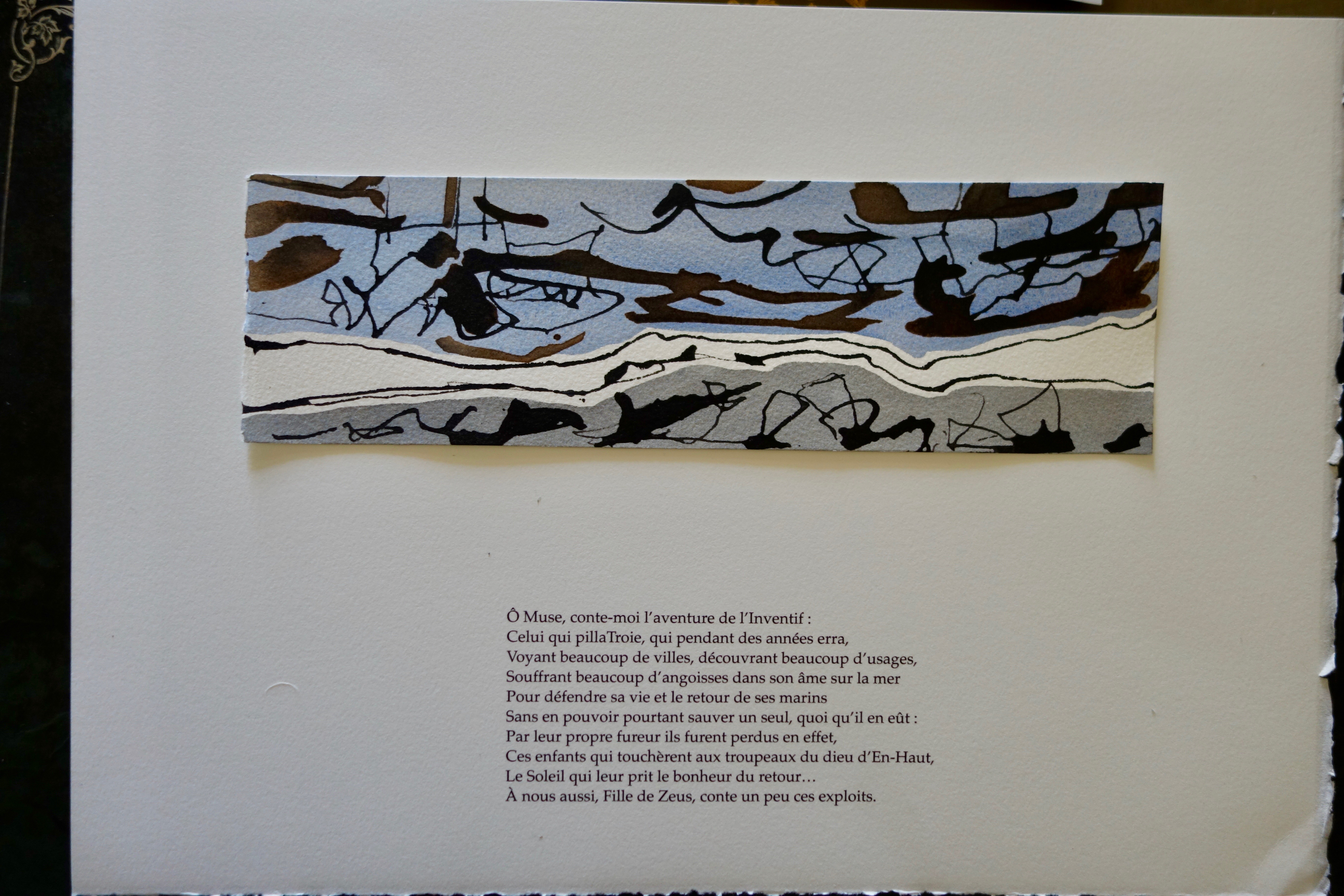 Illustration de l'Odyssée d'Homère (trad. de Ph. Jaccottet) par un artiste contemporain